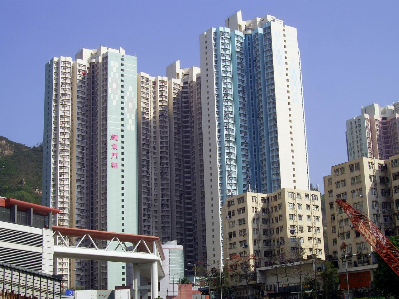 鯉魚門邨